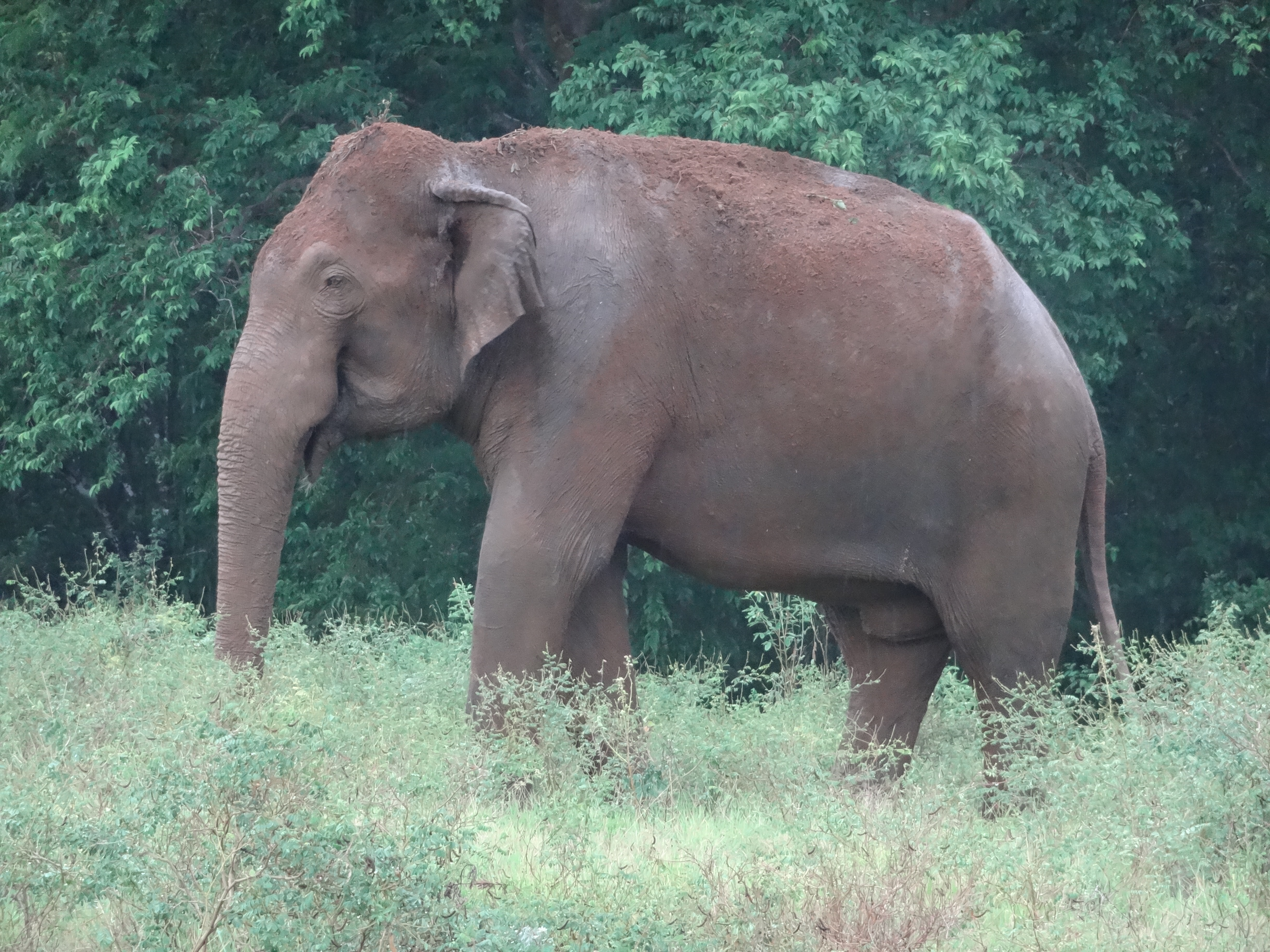 Elefantenbulle (Sri-Lanka-Elefant) im Kaudulla-Nationalpark in Sri Lanka